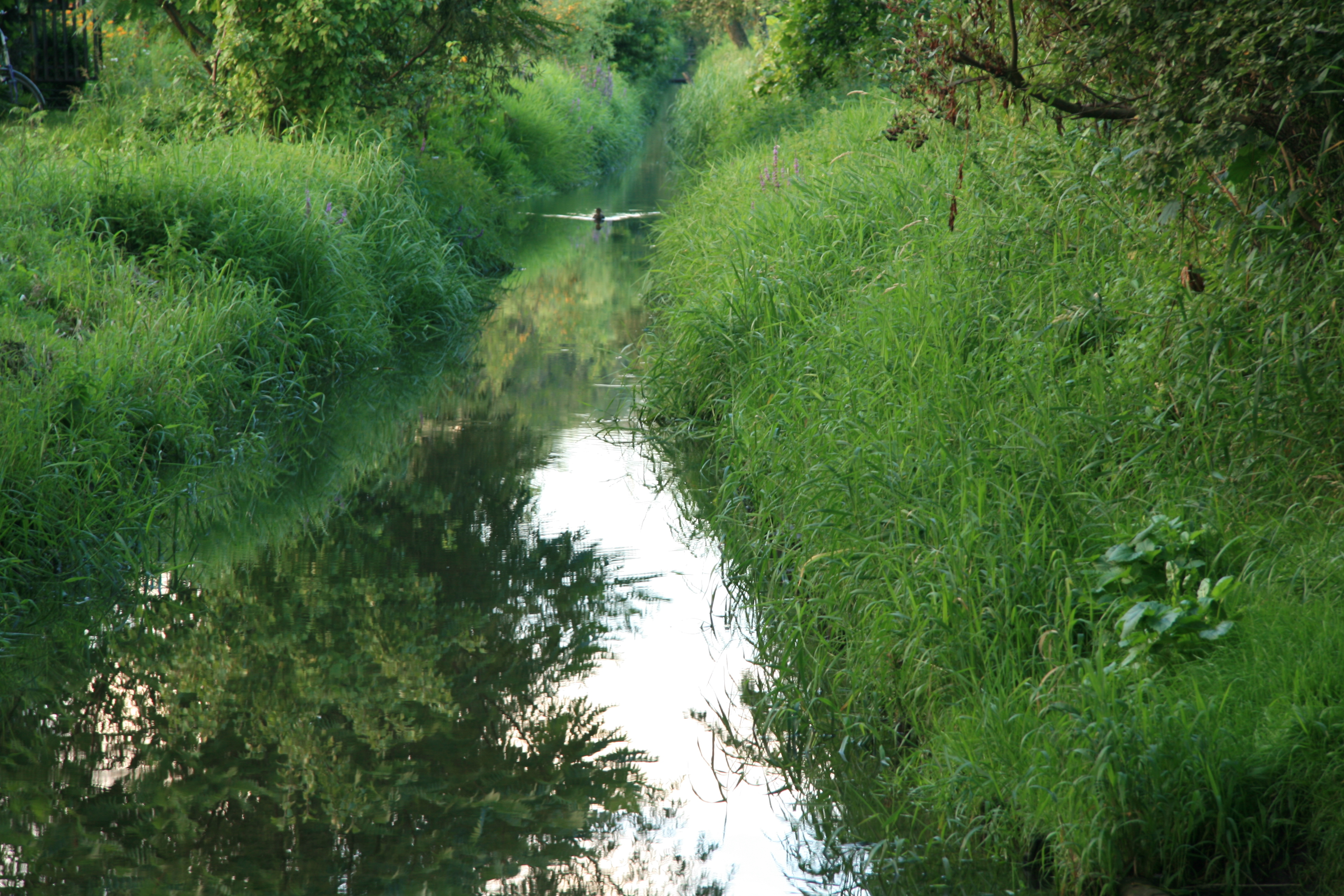 Kluczbork, Poland